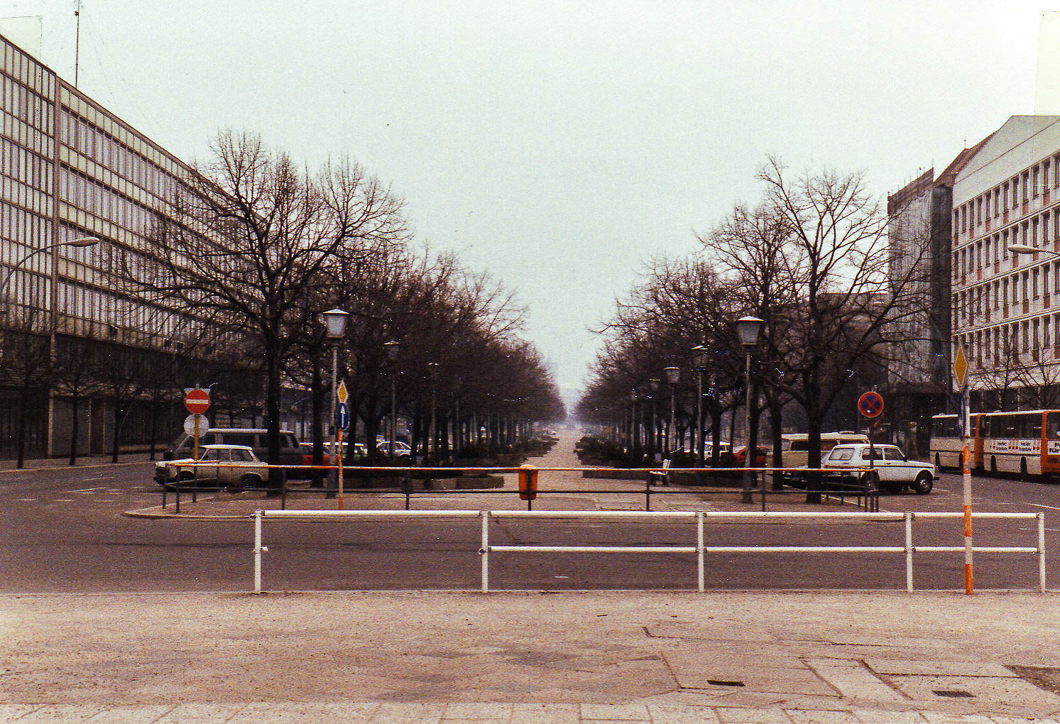 Unter den Linden, Ecke Wilhelmstraße (Jan. 1990)